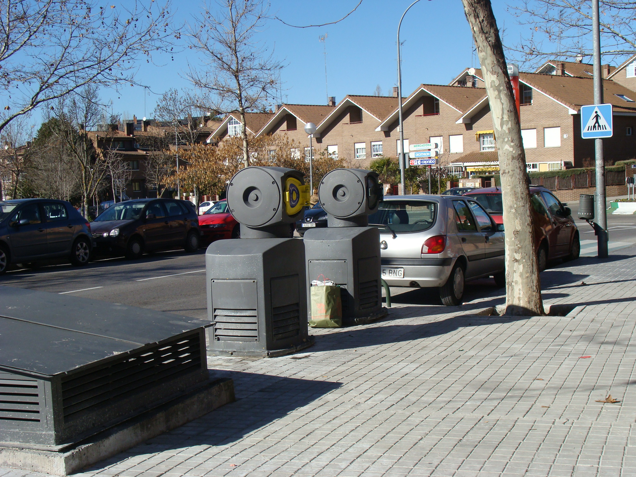 Sistema de recogida neumática de basura. Majadahonda, Madrid